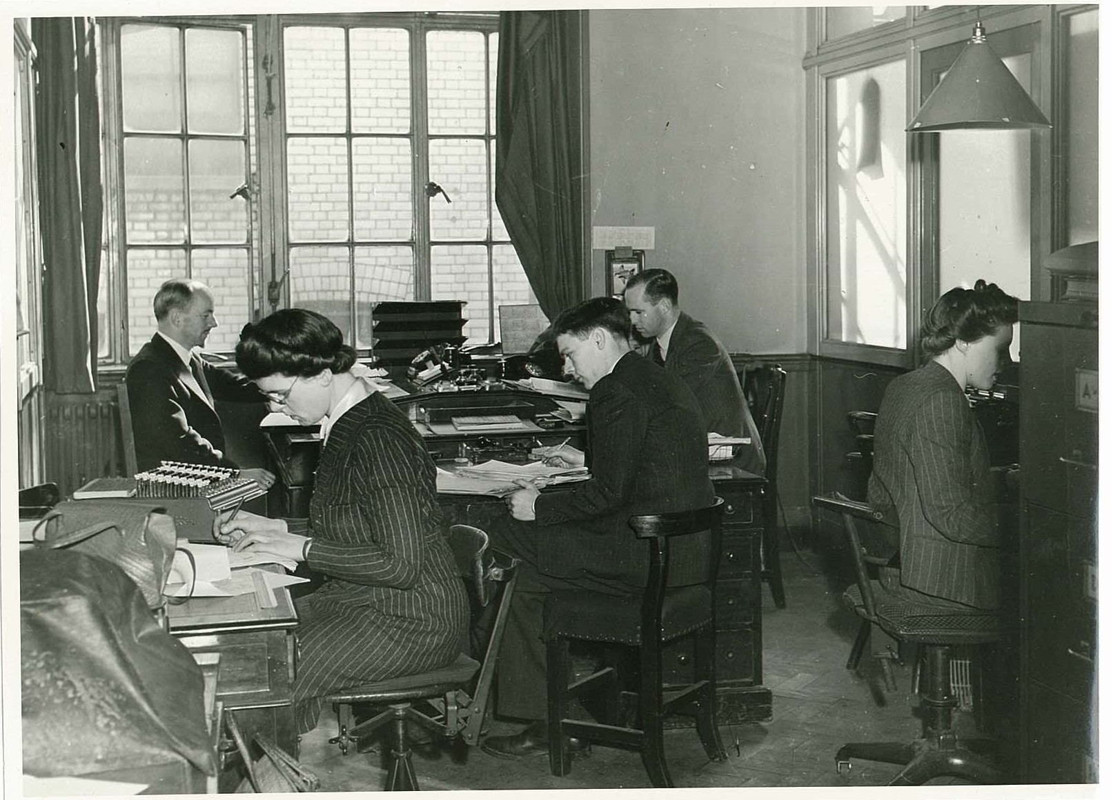 Nortraship London, Tanker Departement 20.03.1944. From left: Rothon, Miss Pontin, Ekerholt, Hagelund, Mrs. M. Mills. Arkivreferanse: Riksarkivet, PA-1209 NTB Ub-47